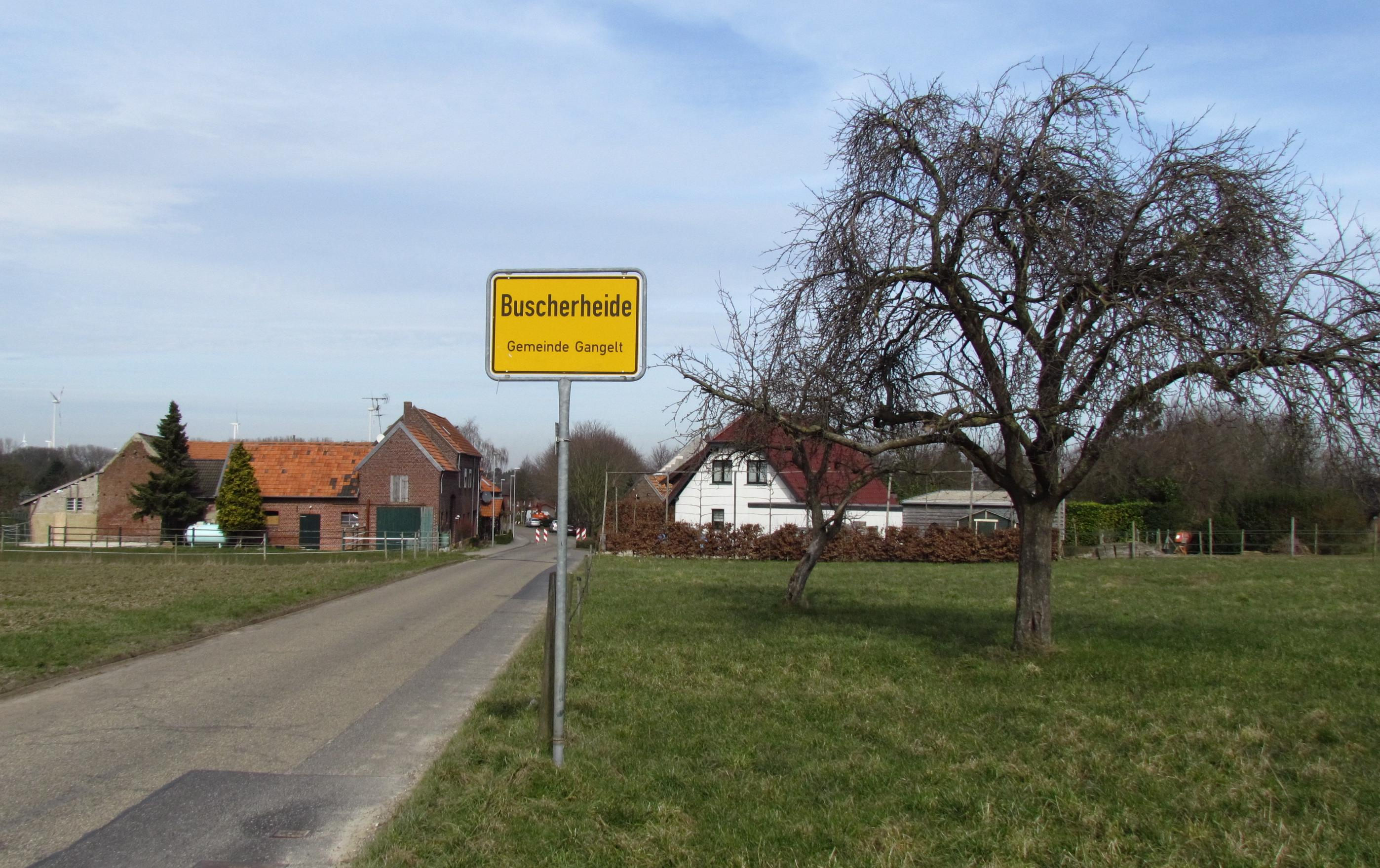 Ortseingang Buscherheide